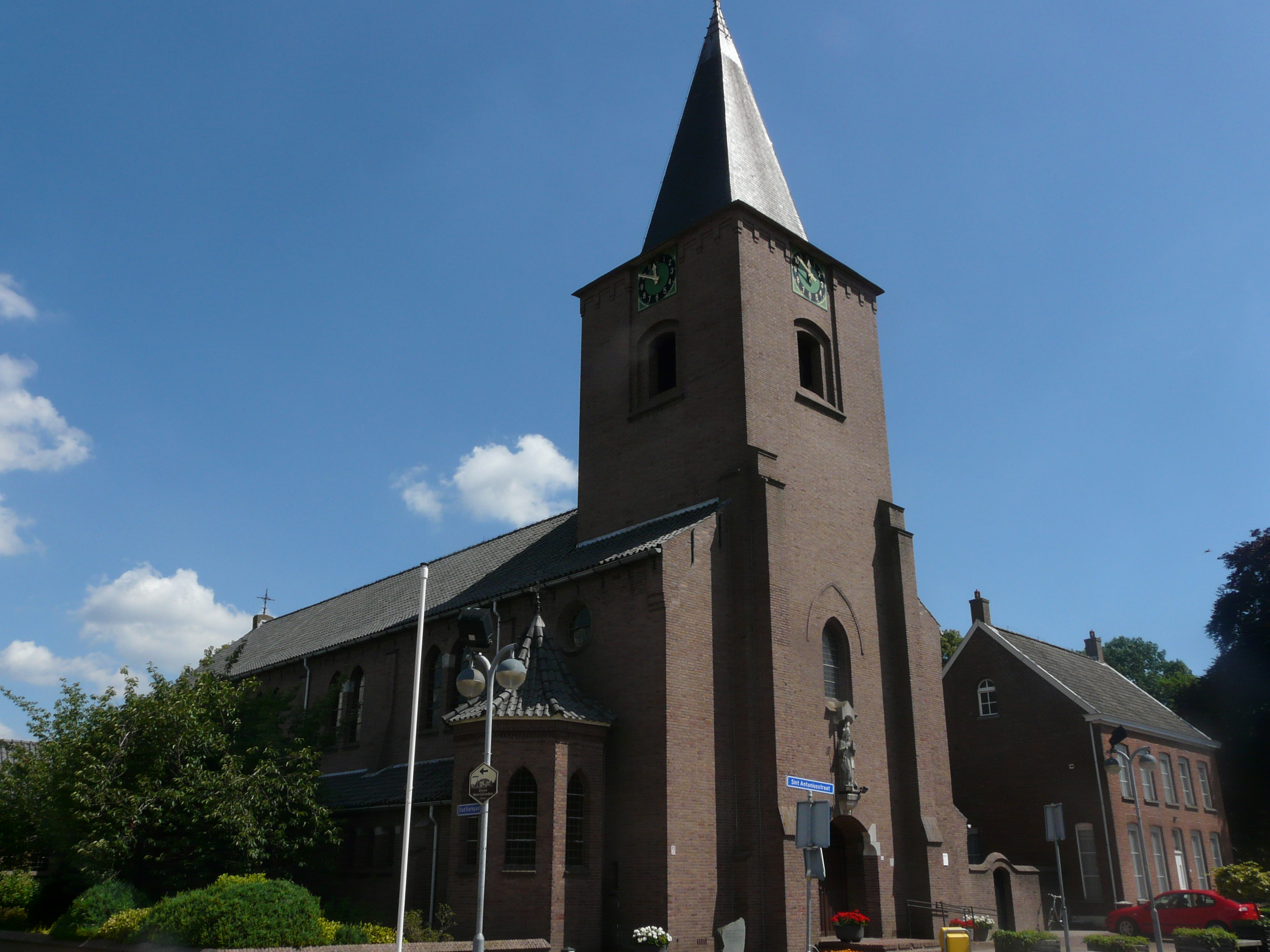 Sint Martinuskerk in Schijf